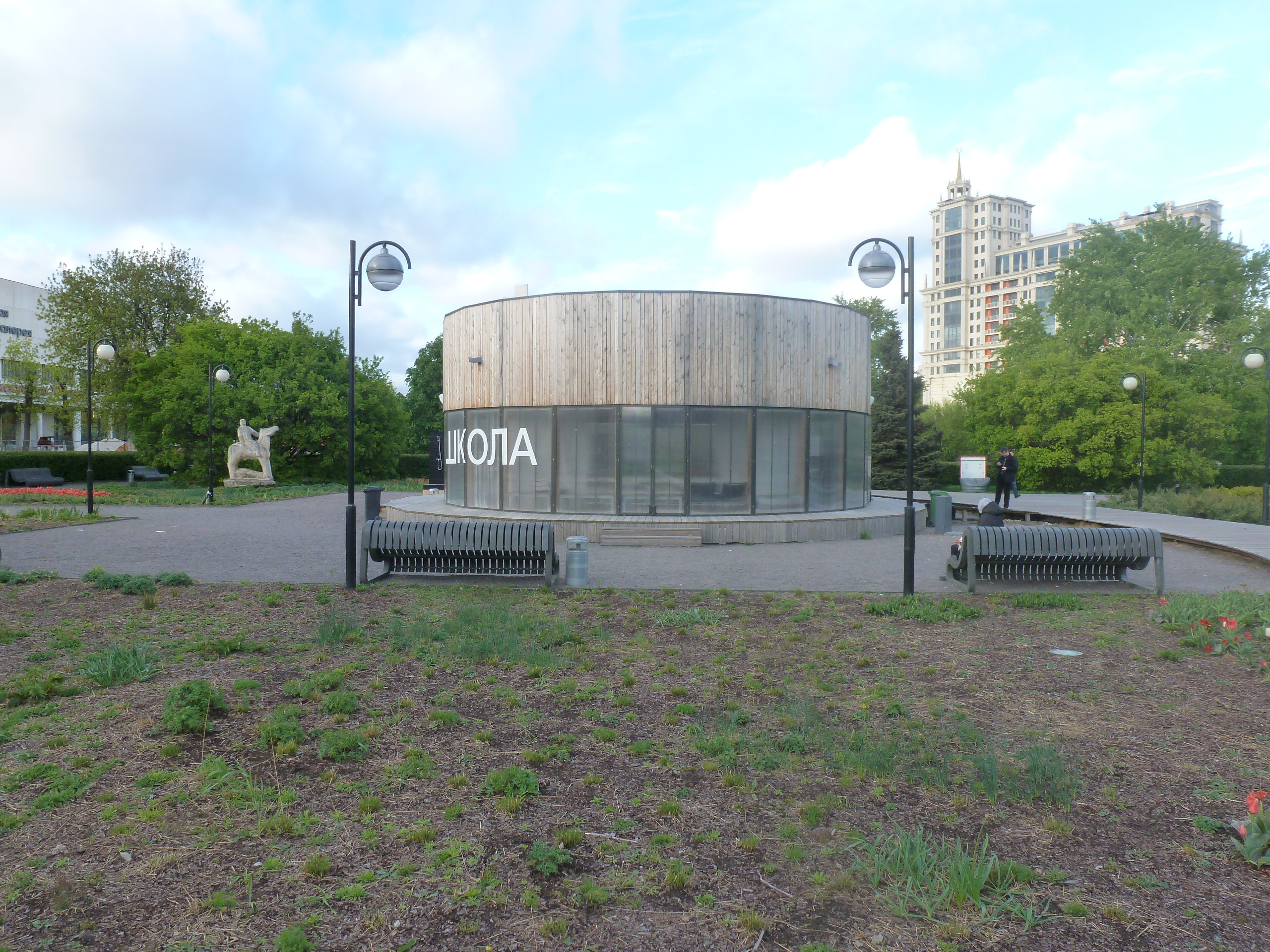 Lernejo en parko "Muzeono", Moskvo, Rusio